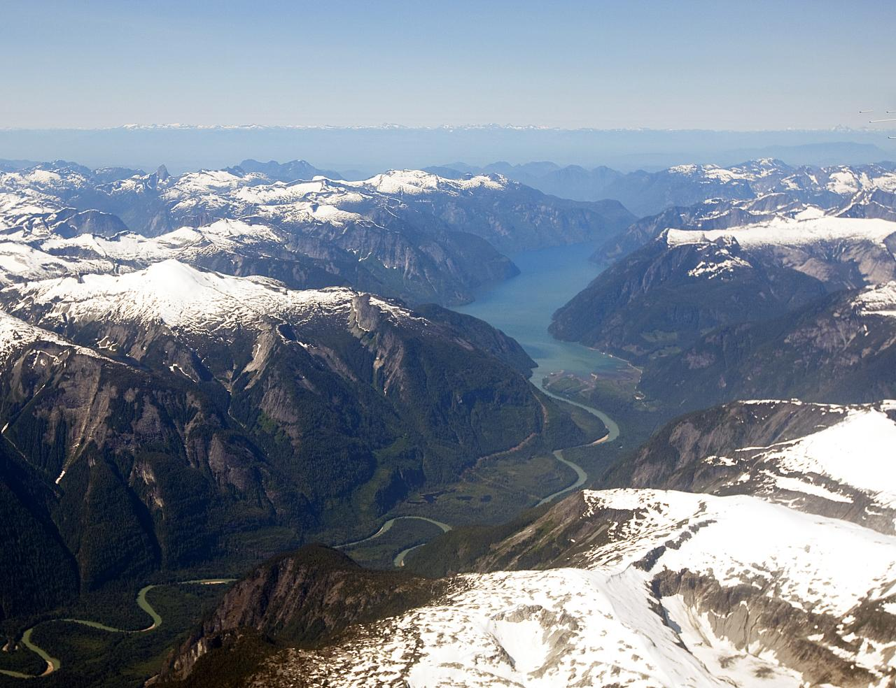 bella coola, bc